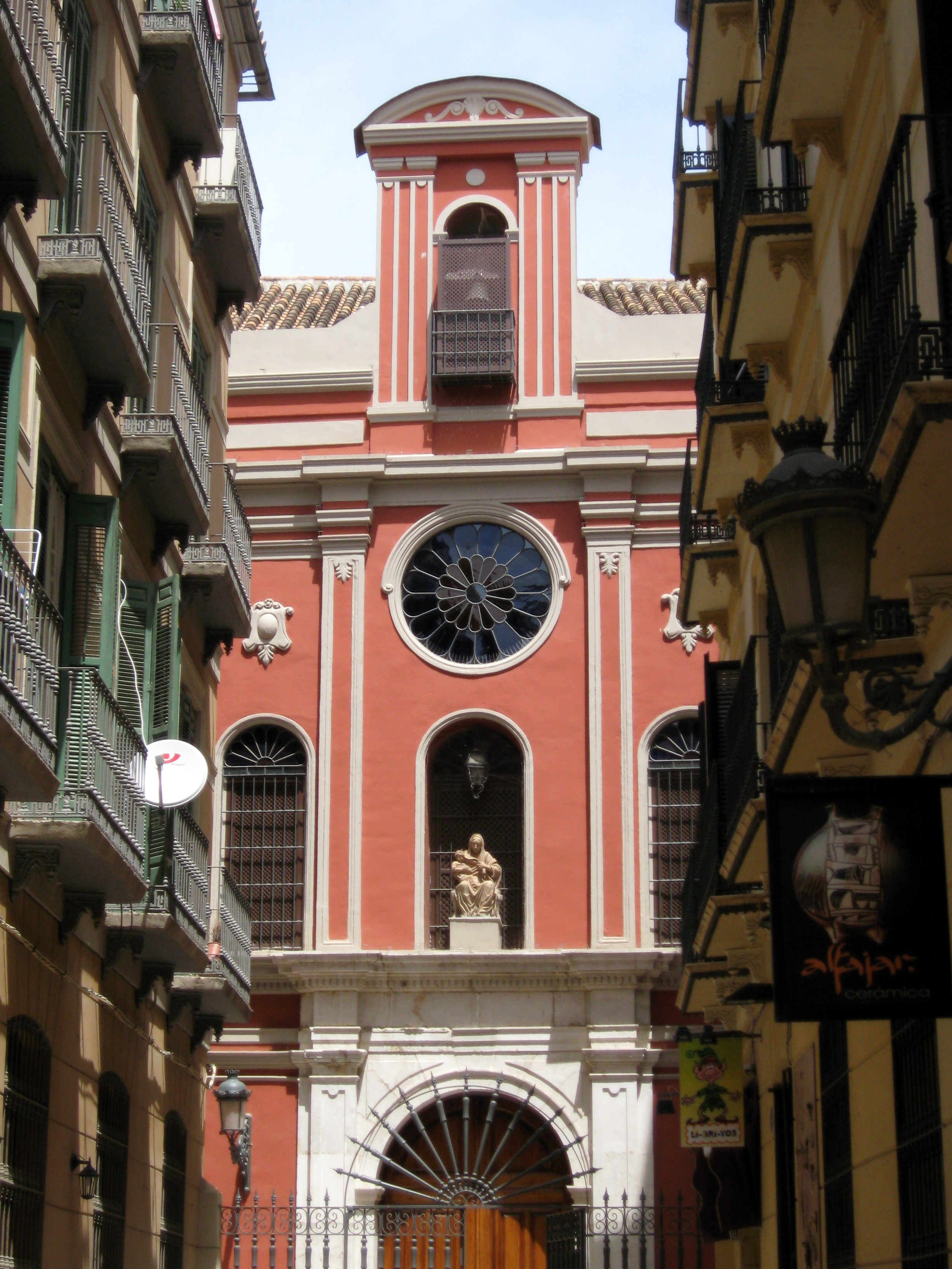 Altstadt von Málaga, Andalusien, Spanien